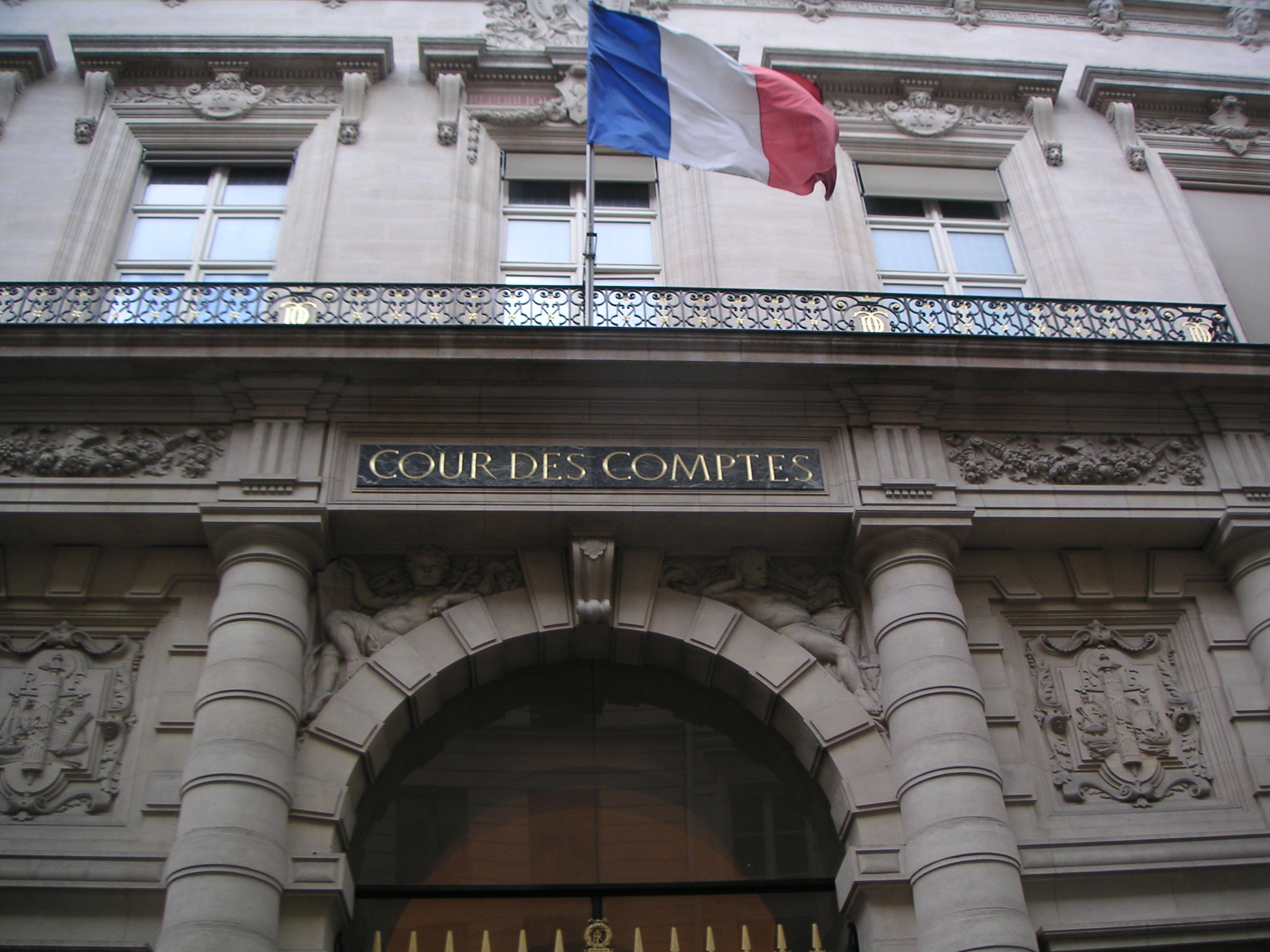 Entrée de la cour des comptes à Paris - Ier arrondissement - Rue Cambon. Prise le : 22/10/2005.